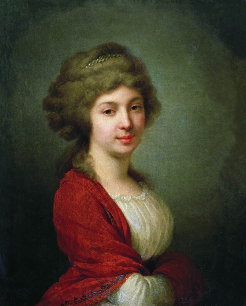 Графиня Вера Николаевна Завадовская (1768 - 1845). Краснодарский художественный музей им. А.В. Луначарского